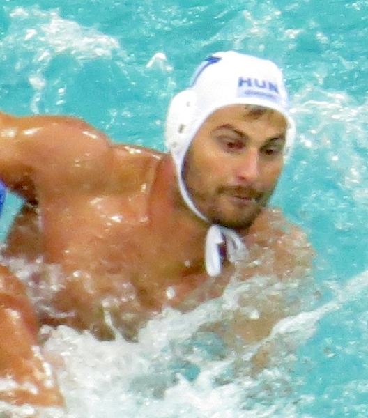 Rio 2016. Polo aquatico. sx50 59